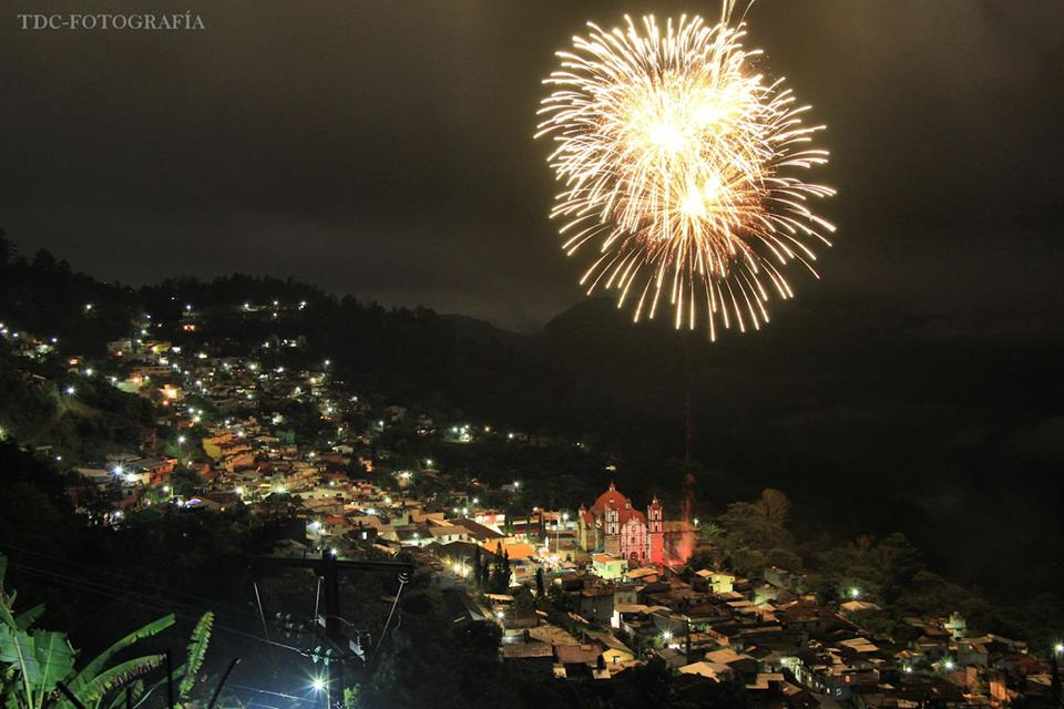 Villa Talea de Catro